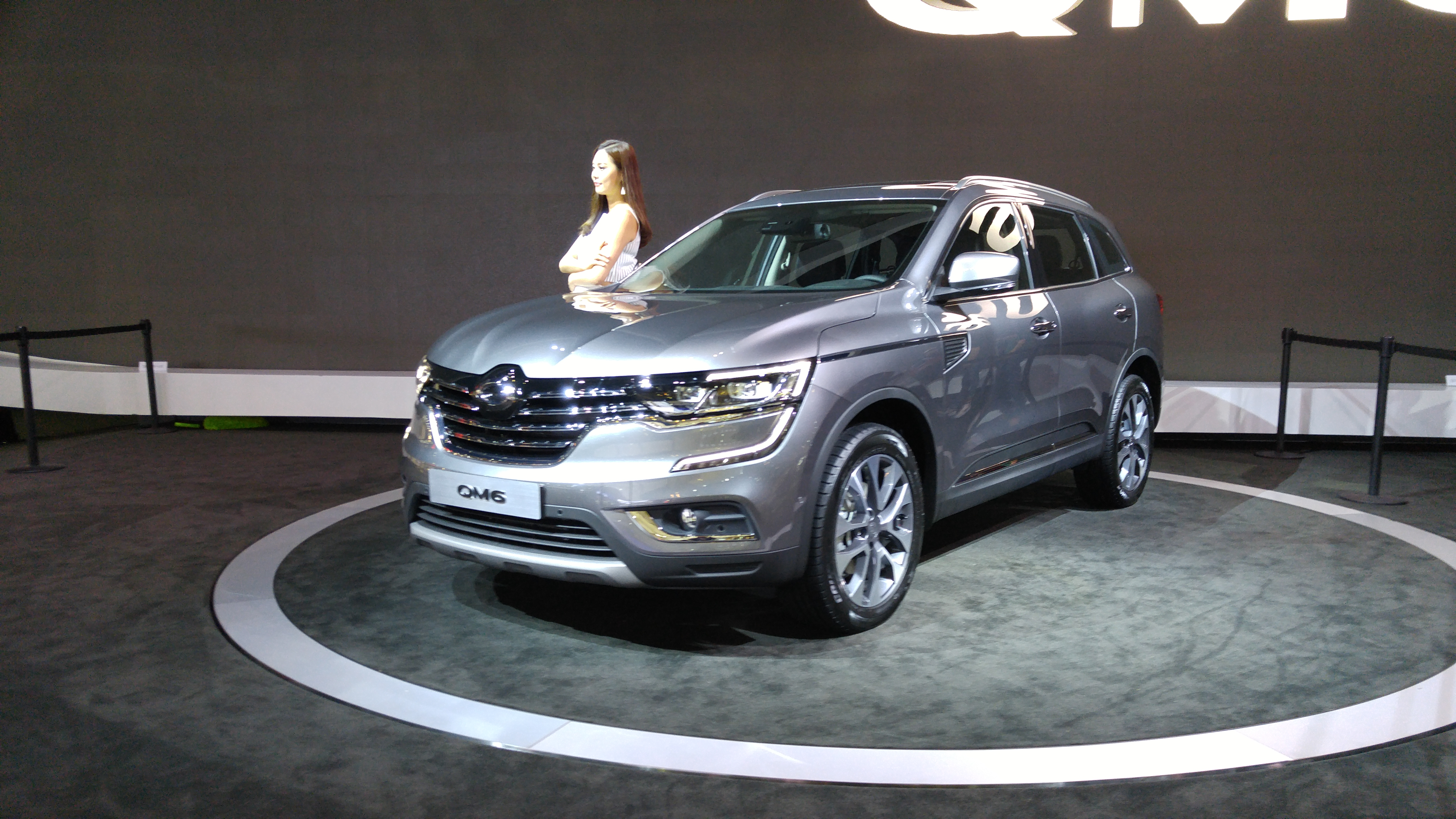 ルノーサムスン・QM6